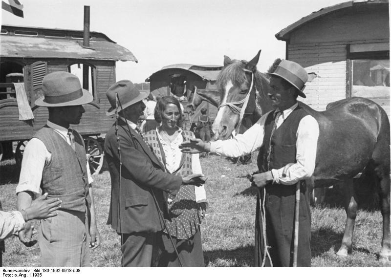 Europas grösster Pferdemarkt in Wehlau. Zigeuner beim Pferdeverkauf. 1935 Information added by Wikimedia users.Wehlau, heute Snamensk